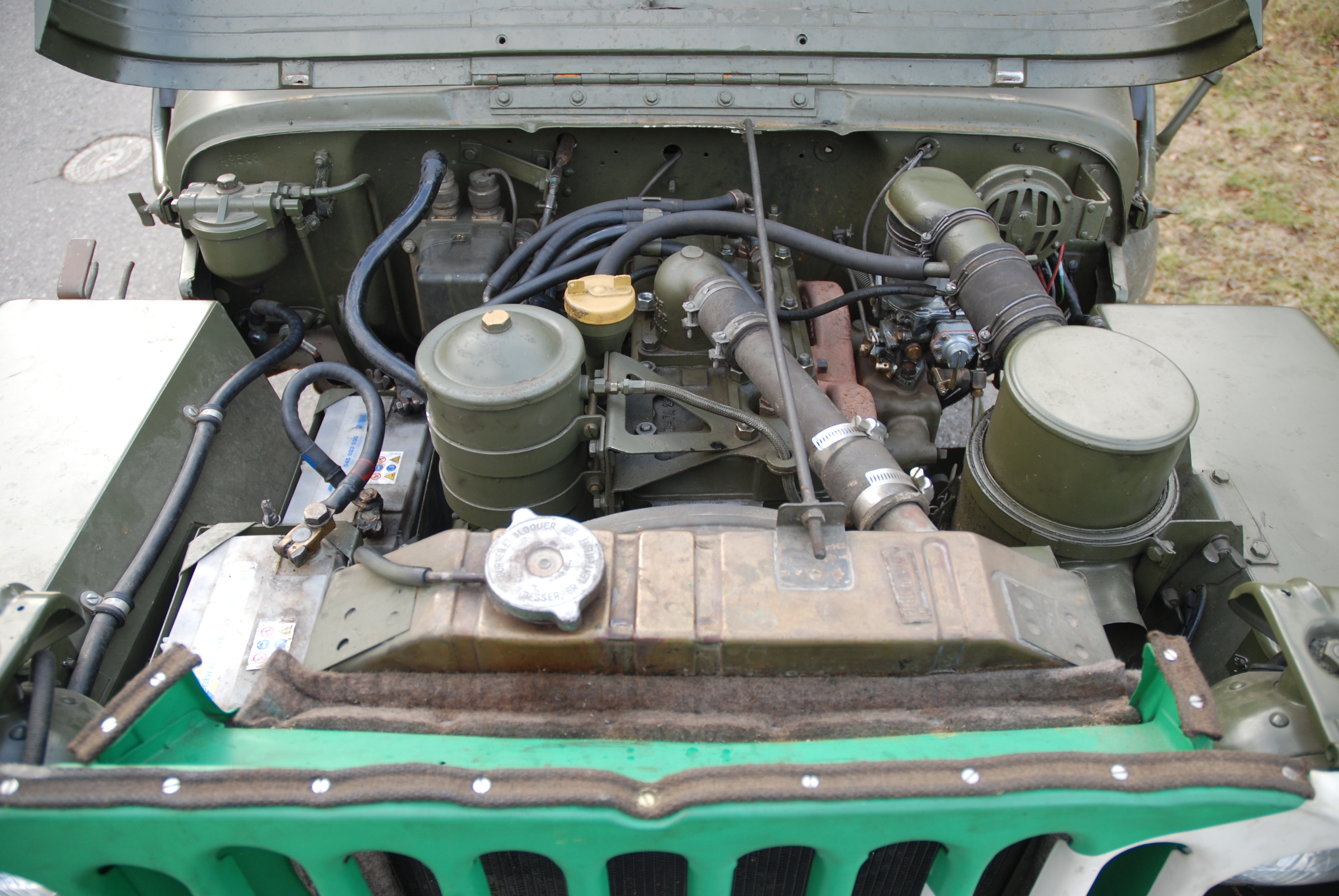 Hotchkiss Jeep M201 engine